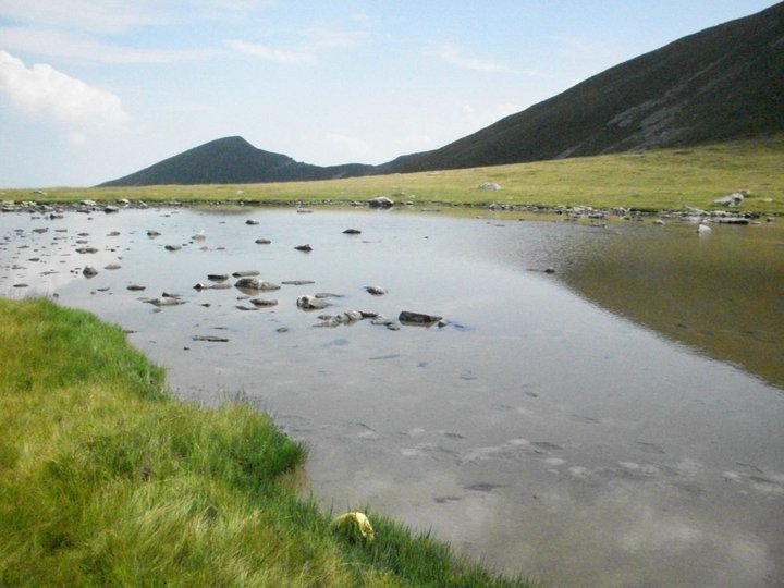 Dolno Dobroško Ezero